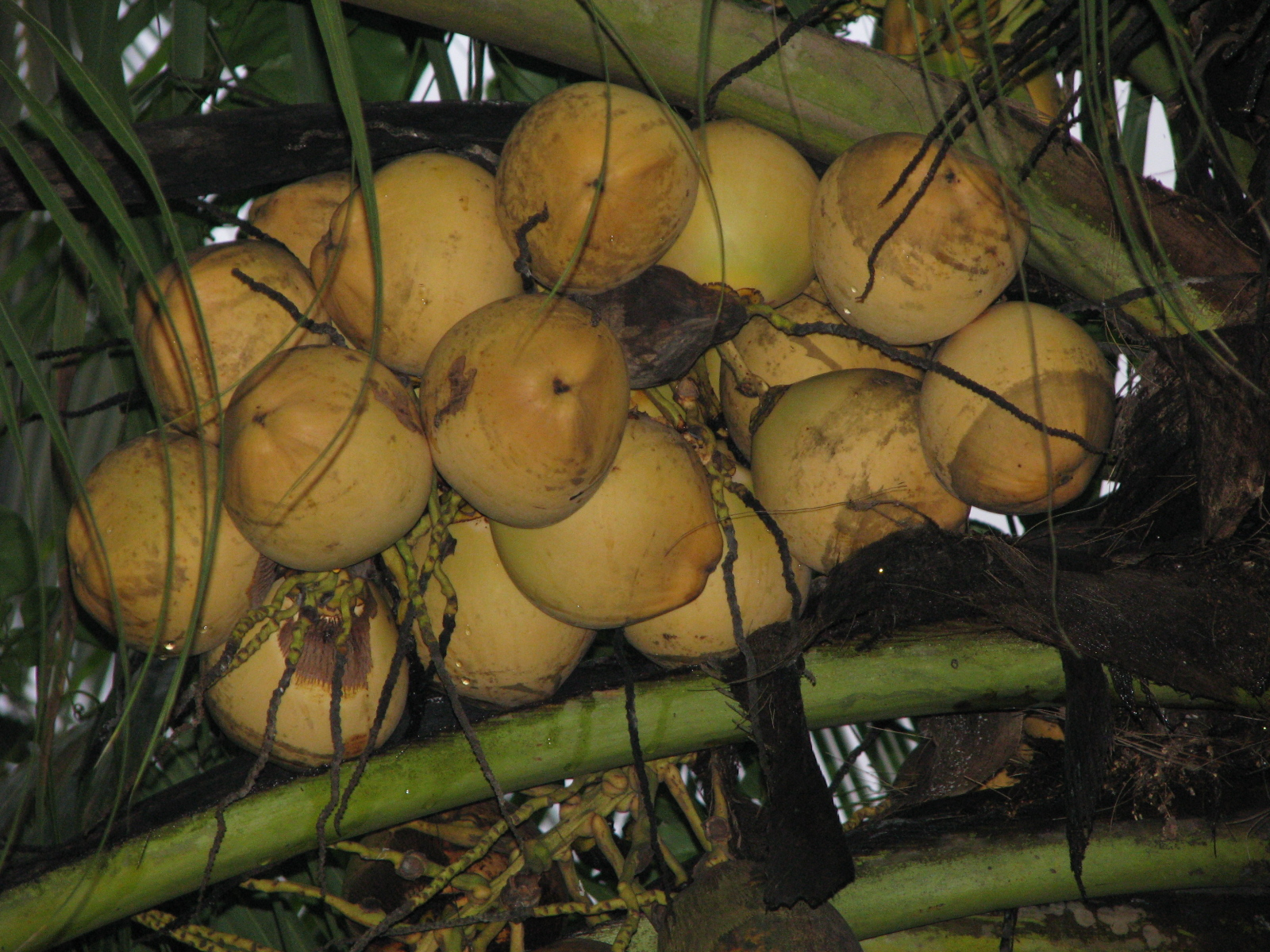 കരിക്കിനായി വളർത്തുന്ന പ്രത്യേകത്രം തെങ്ങിലെ കരിക്കിൻ കുല